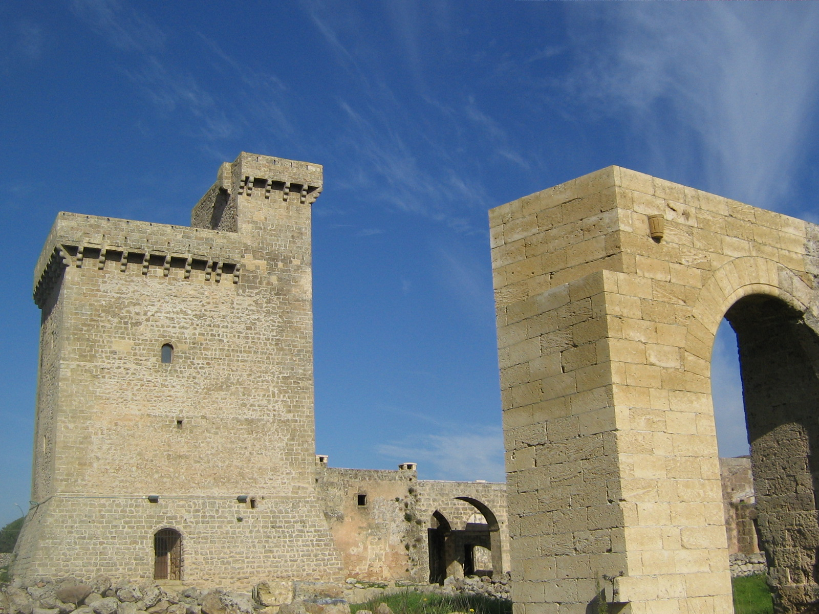 Masseria di Gelsorizzo Acquarica del Capo